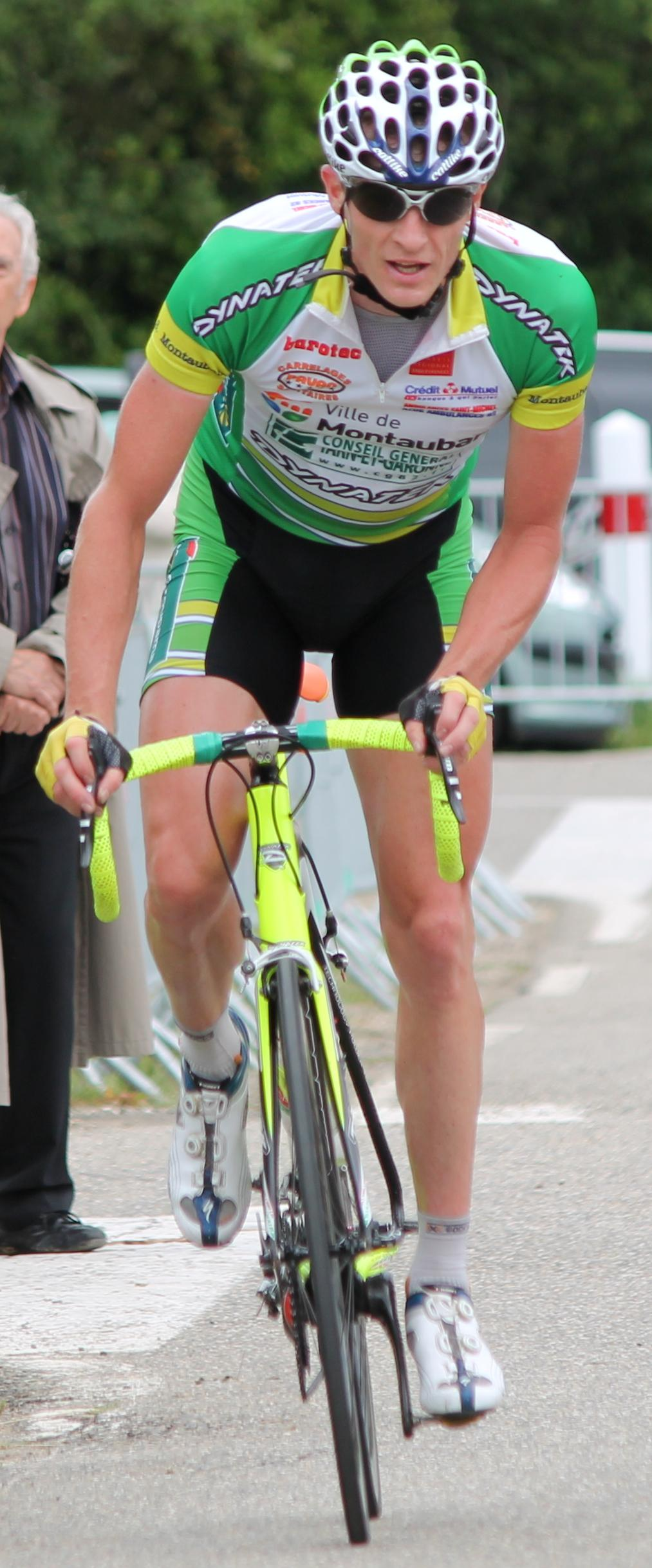 Gilles Canouet à l'occasion des Championnats de Midi-Pyrénées 2012 sur route, disputés à Montauban sur le Circuit du Fau.